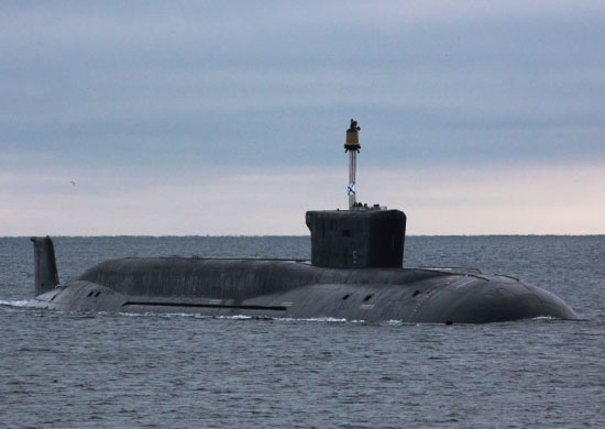 ракетный подводный крейсер стратегического назначения